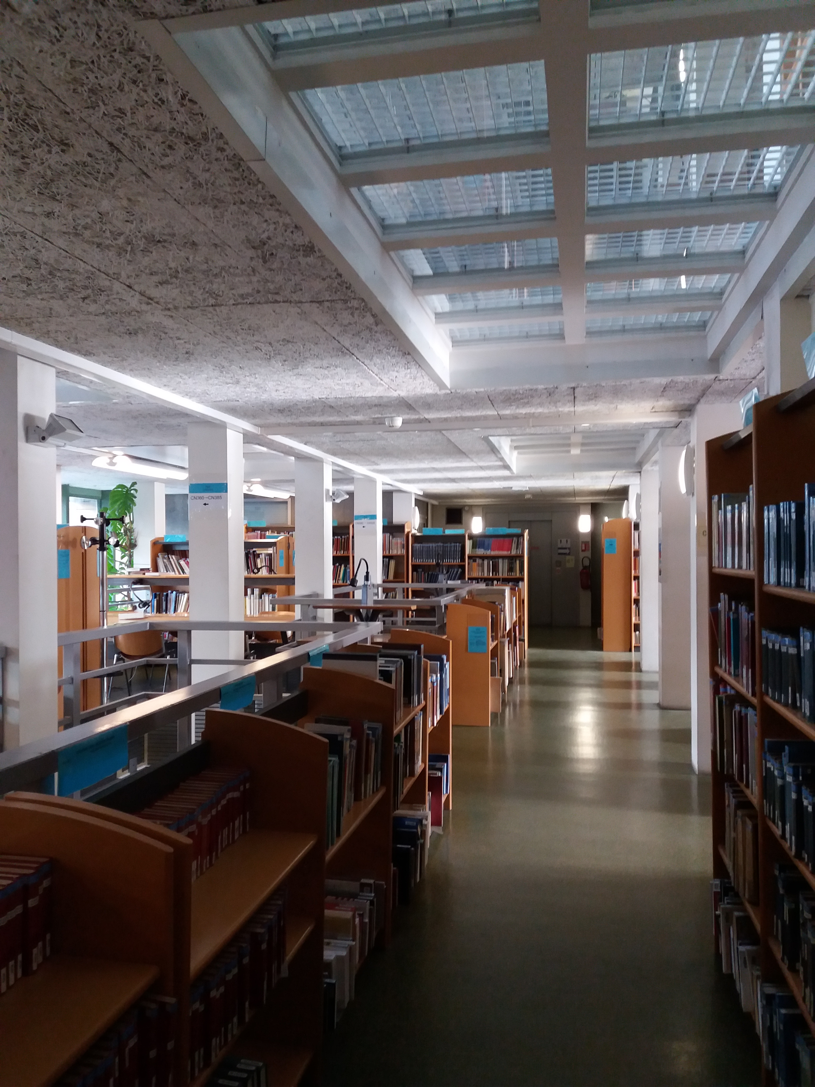 Quatrième étage de la bibliothèque.